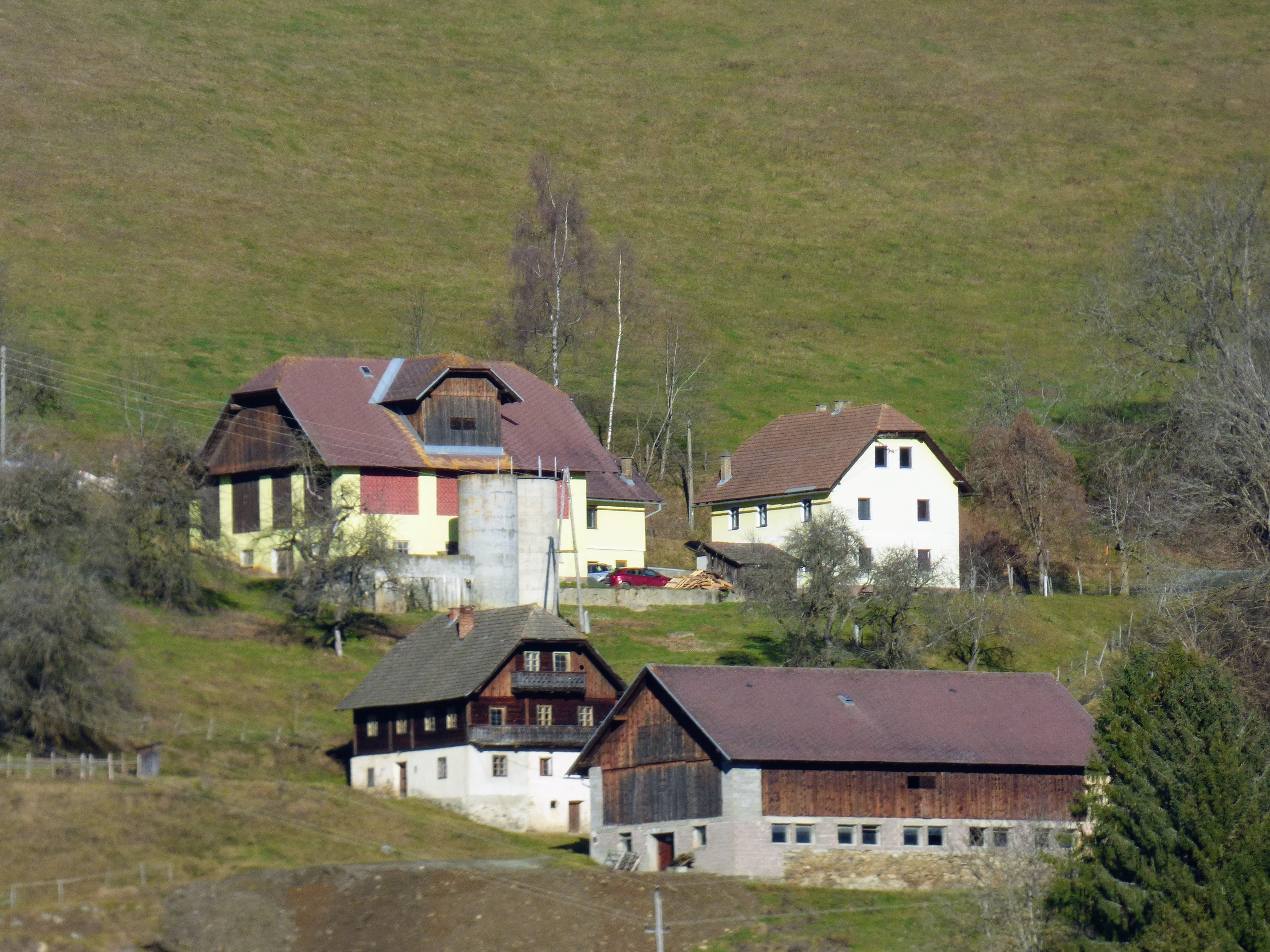 Rasting, Gemeinde Liebenfels oben: Haus Nr. 3 unten: Haus Nr. 4